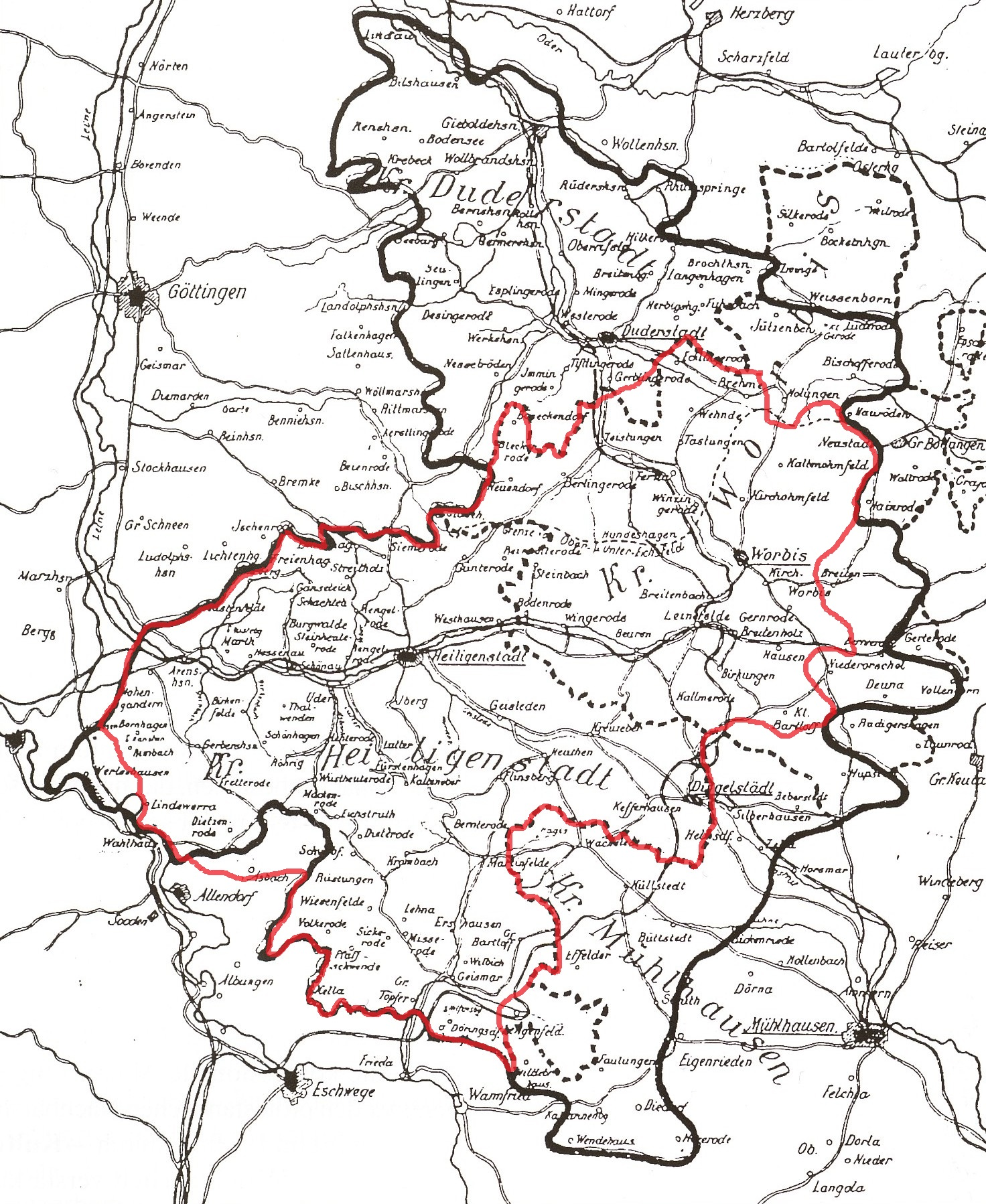 Das Eichsfeld 1900: Der Landkreis Worbis/Eichsfeld (mit Sitz in Heiligenstadt) 1945 bis 1952, Stand 1946-1952 mit Grenzveränderung durch Abtretung von Orten an den Landkreis Nordhausen